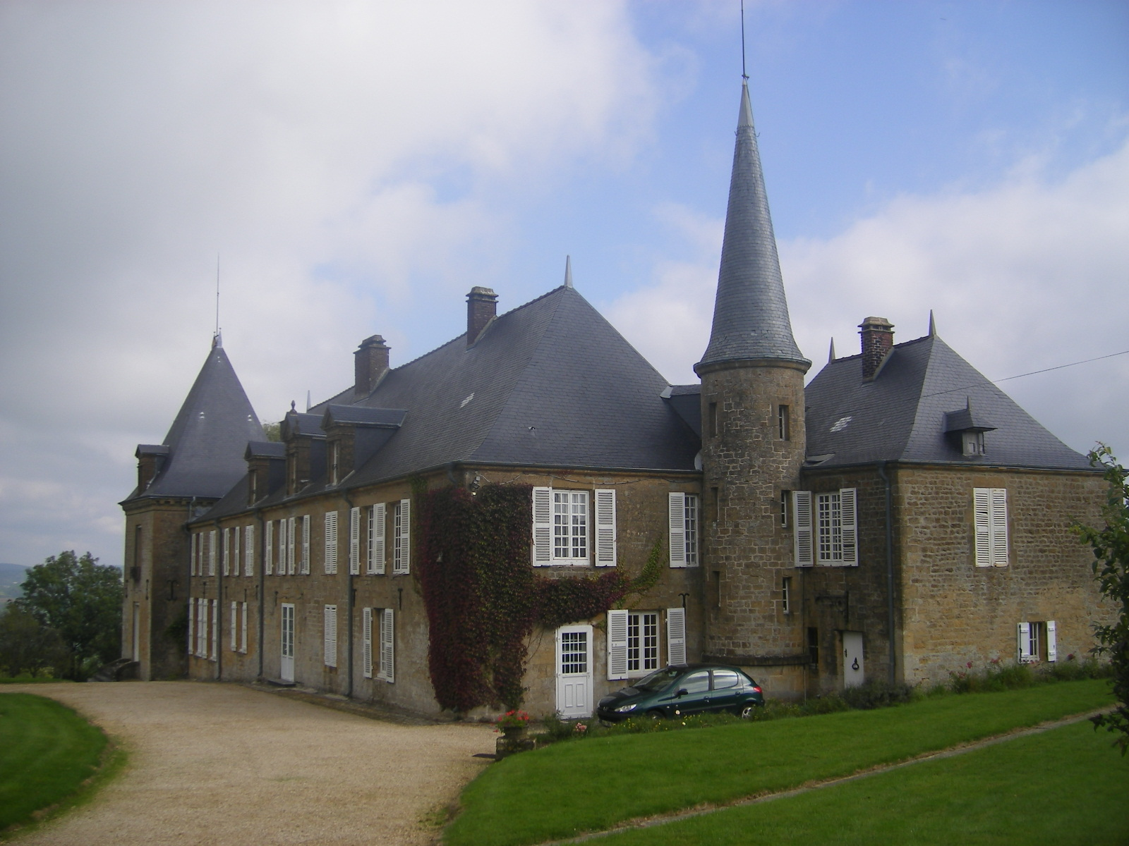 Remilly-les-Pothées - Hardoncelle Castle